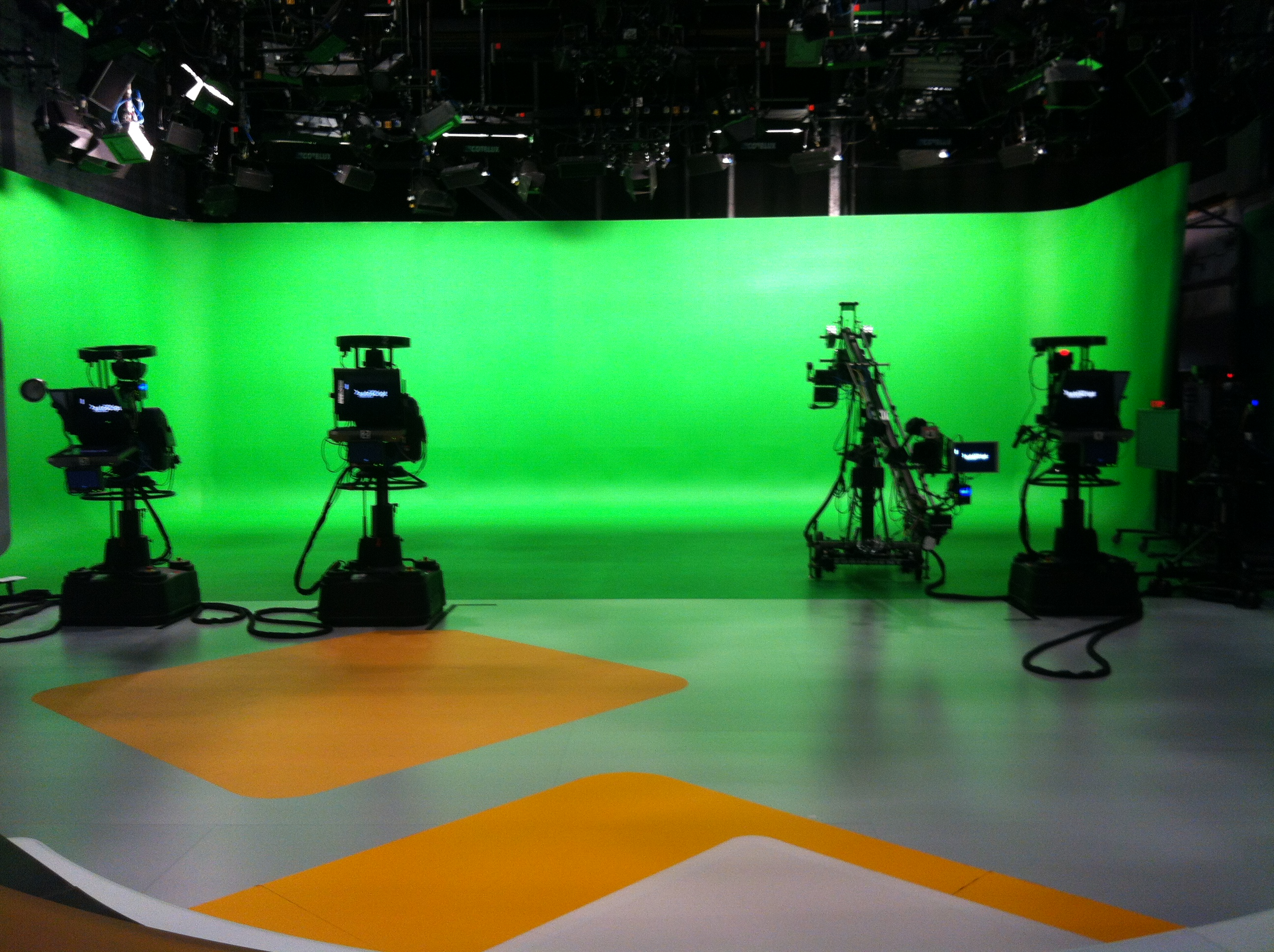 Plato de Televisió de Catalunya